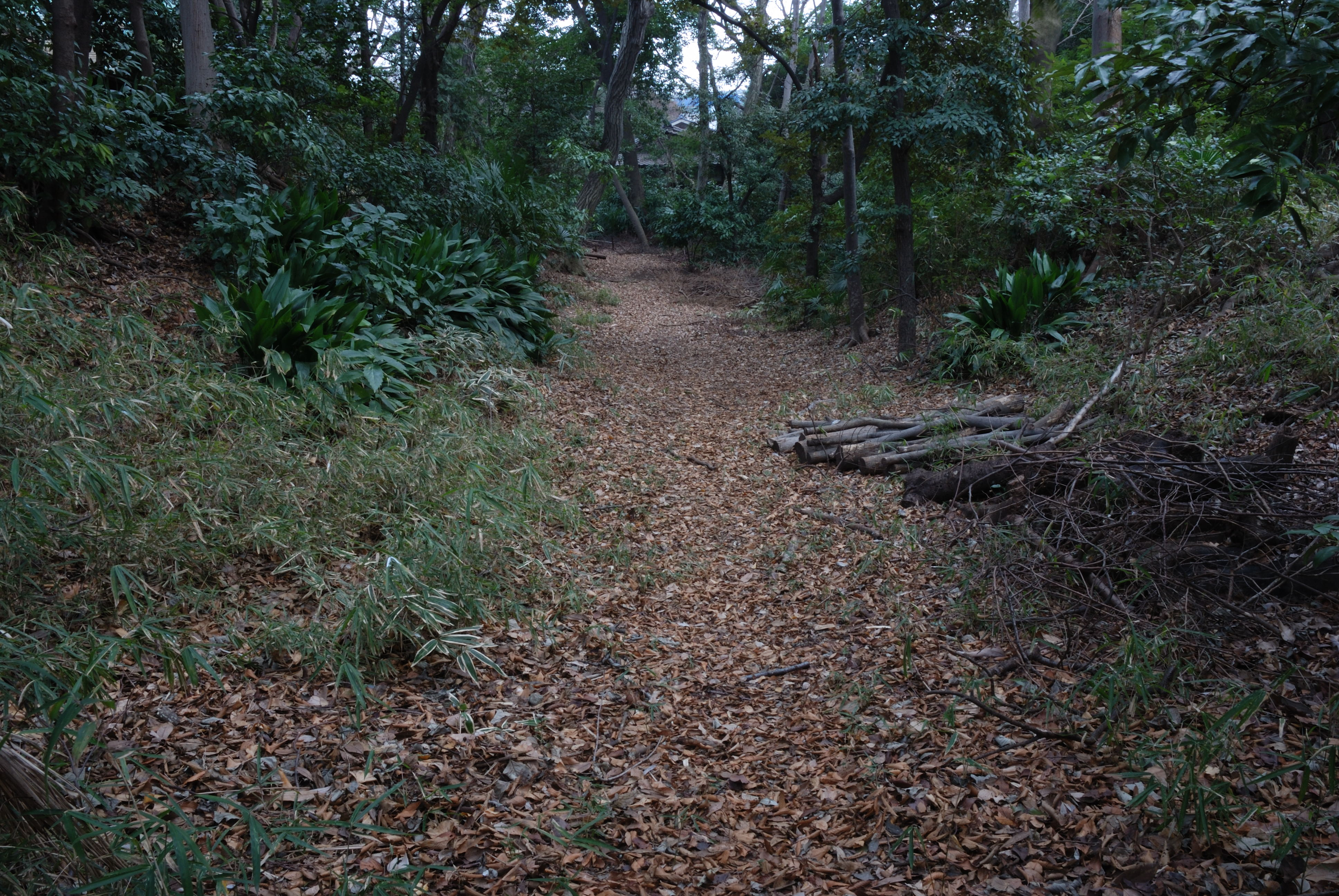 Shimura castle karabori